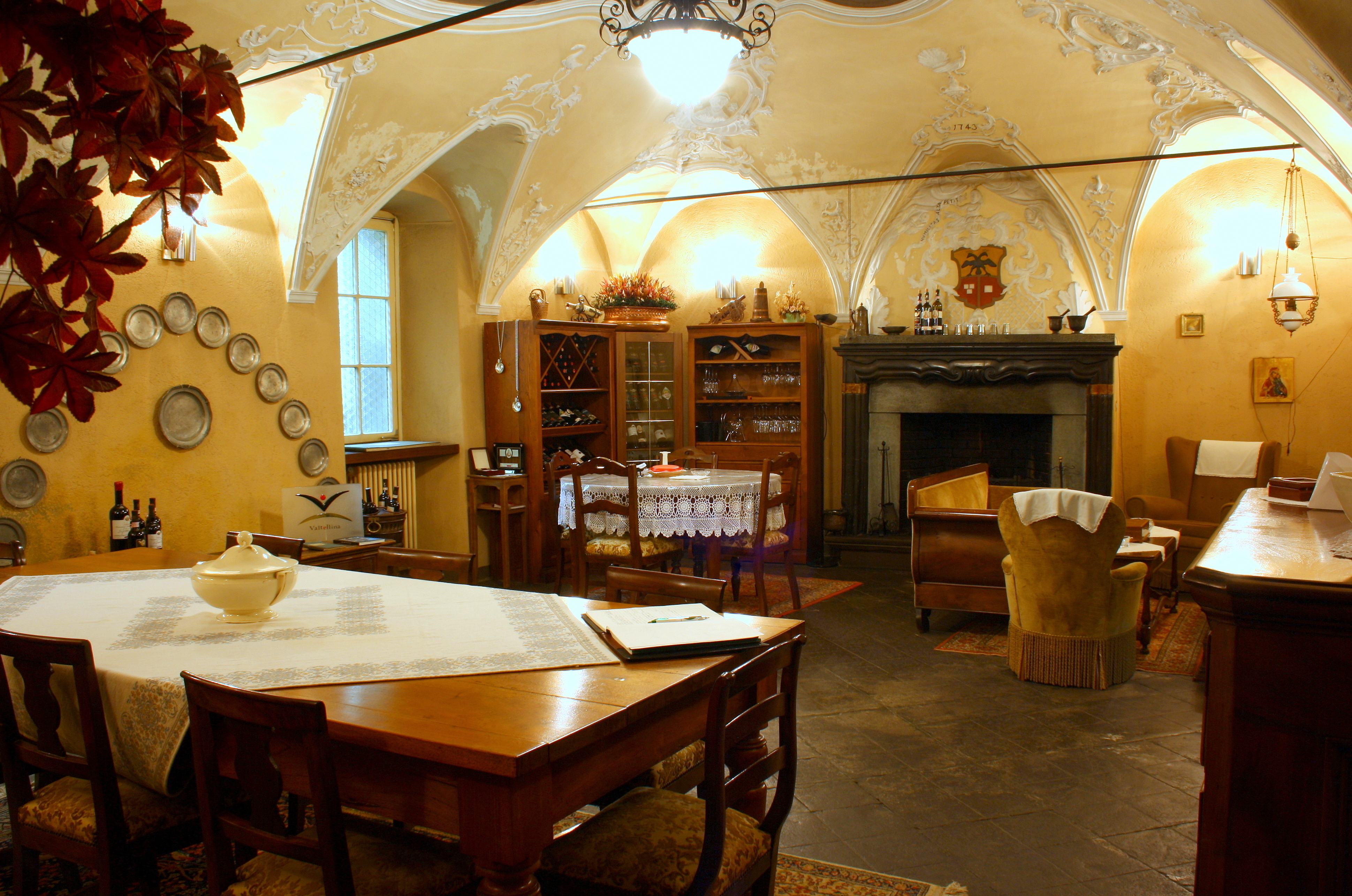 Il locale più importante dell'abitazione di Maurizio Quadrio